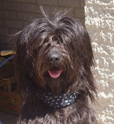 Onze gos d'Atura, zelf gefotografeerd in juni 2006 en beschikbaar gesteld voor wikipedia gebruikers